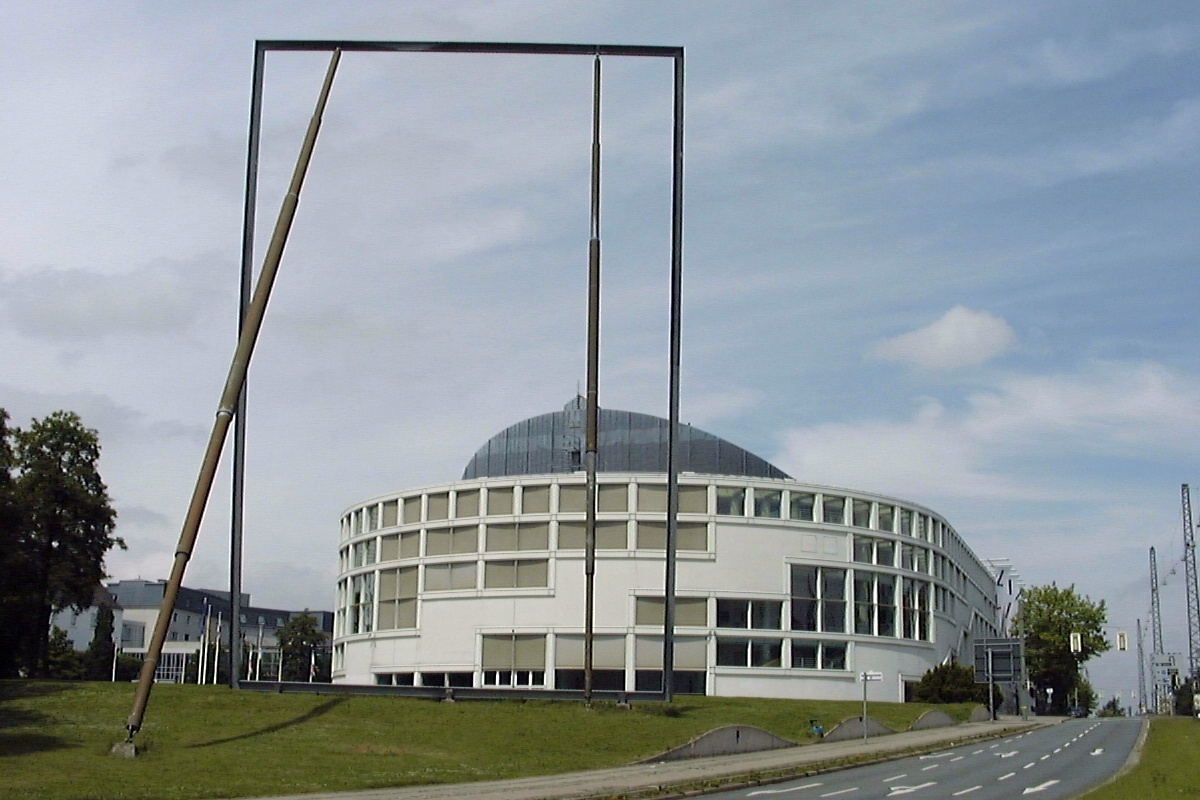 Bielefeld, Deutschland: Stadthalle mit der Skulptur „Spiegel“